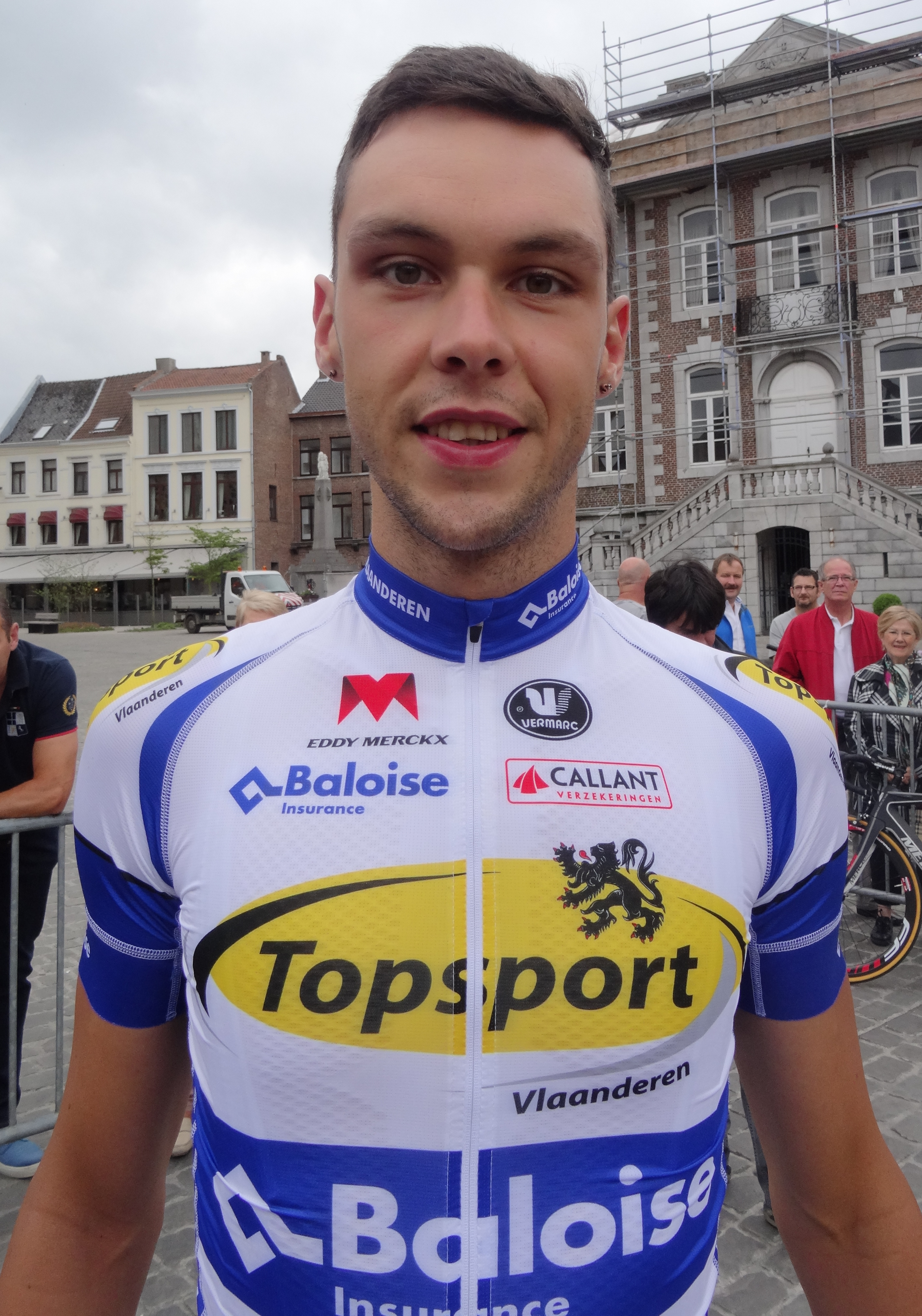 Reportage photographique réalisé le dimanche 15 juin à l'occasion du départ et de l'arrivée du Tour du Limbourg 2014 à Tongres, Belgique.